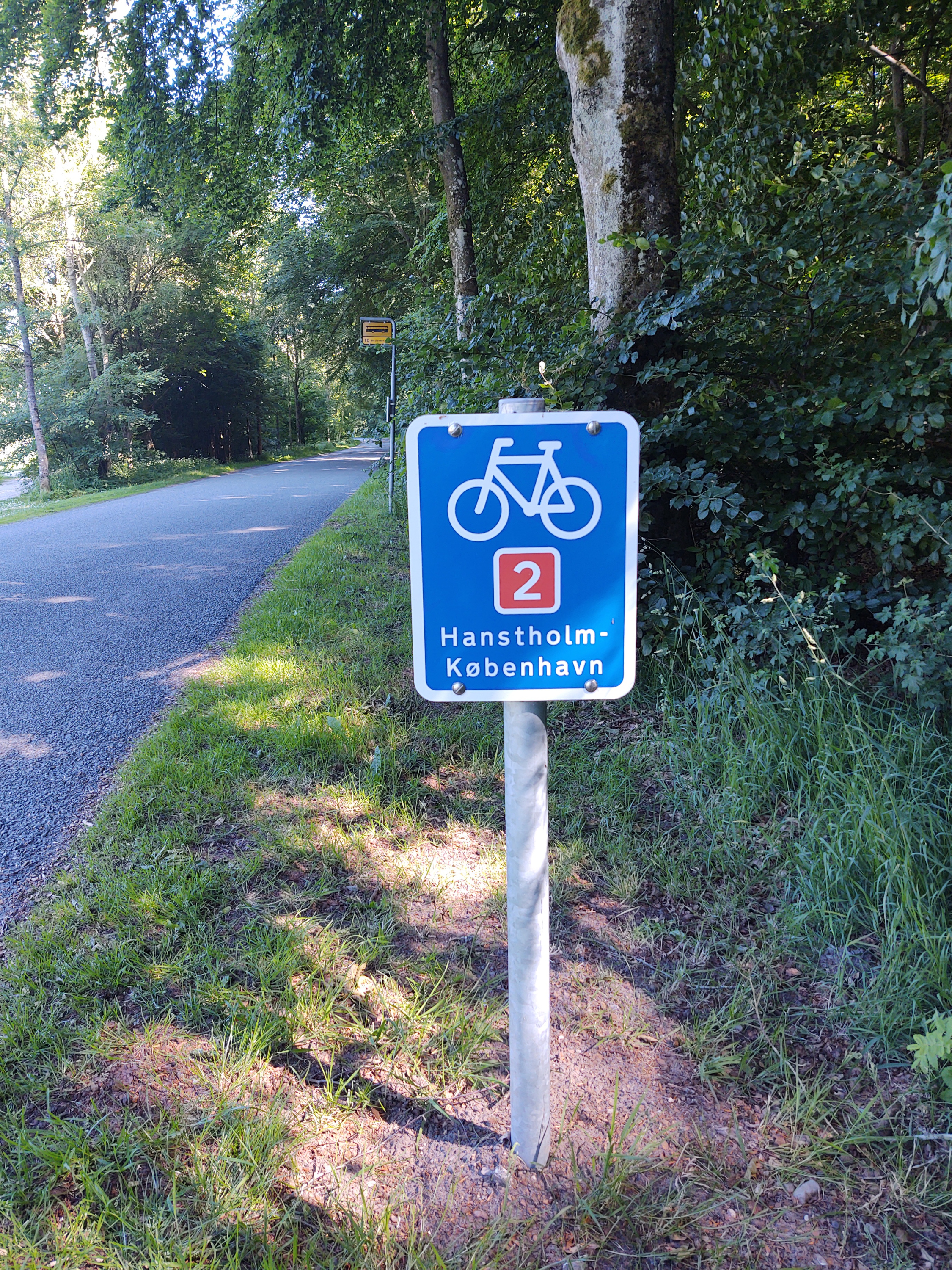 Skiltning af national cykelrute 2 Hanstholm - København.